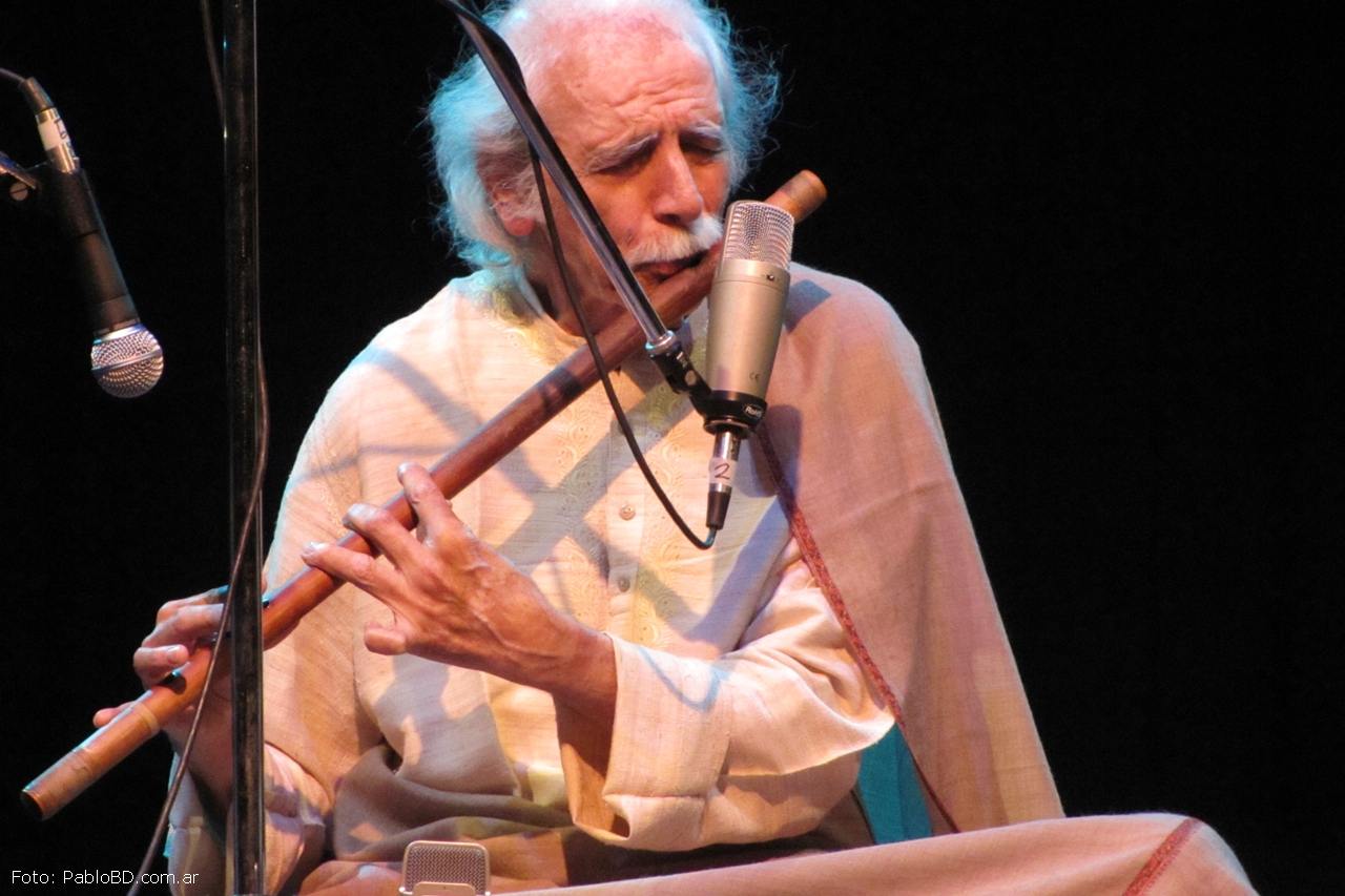 Bansuri Venu Flute classical Indian music instrument Flotistin, Flute player, Flötistin